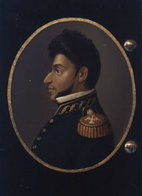 Caja de rapé con retrato de Vicente Guerrero Firmado por «Stobriafsers» (Alemania) Latón esmaltado sobre madera laqueada Principios del siglo XIX